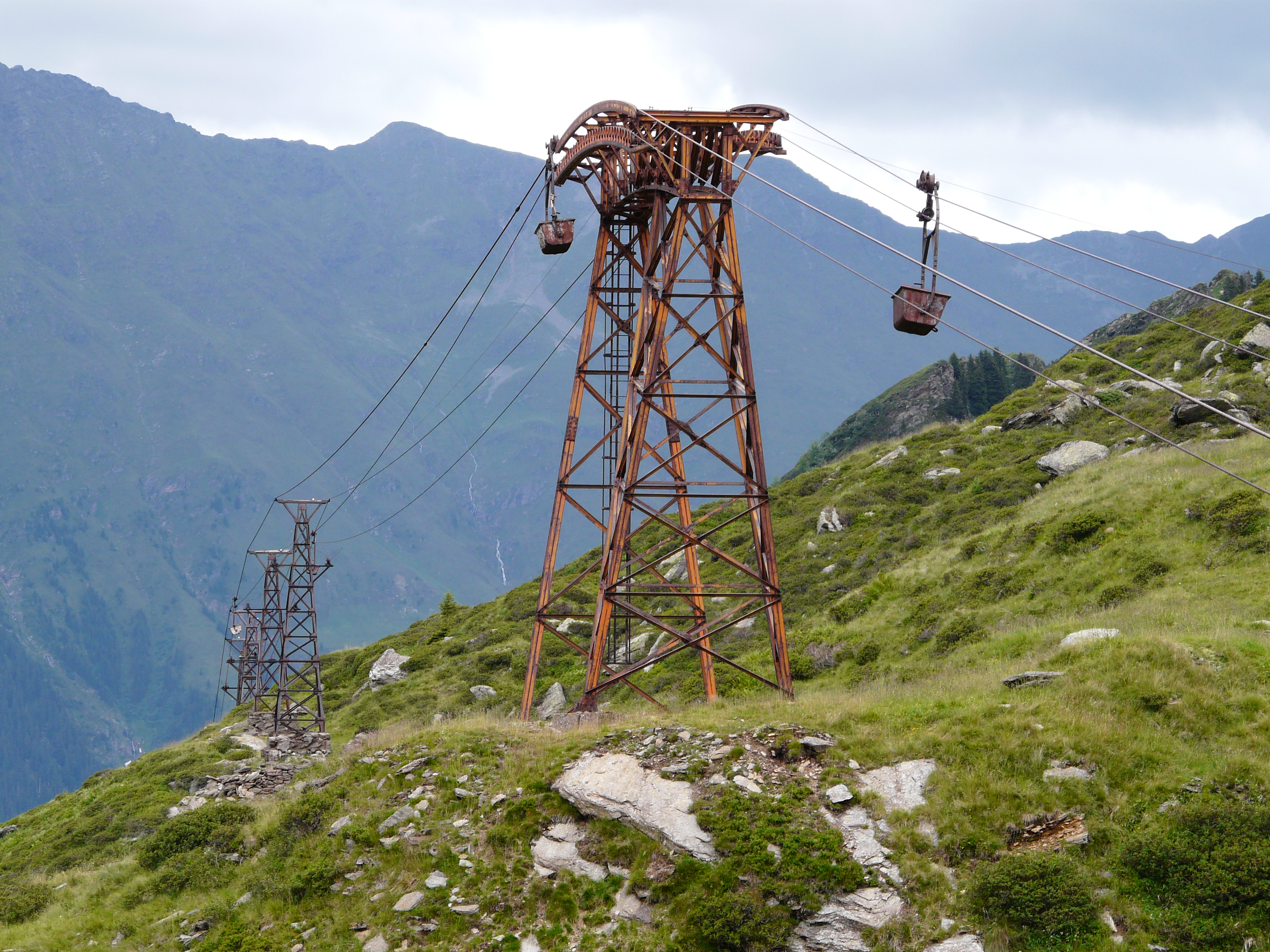 Ehemalige Erzseilbahn im Lazzacher Tal (Südtiroler Bergbaumuseum im hinteren Ridnauntal)